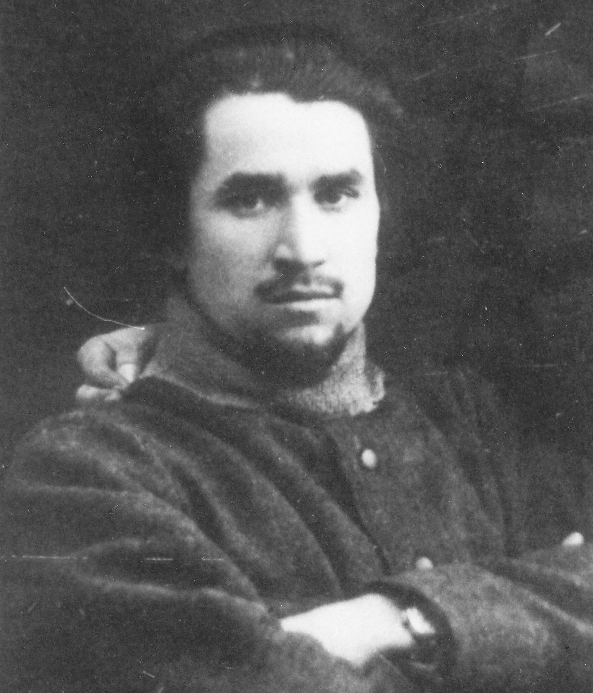 Sultan Galiyev, Turkish Russian revolutionist (b.1882-d.1940)